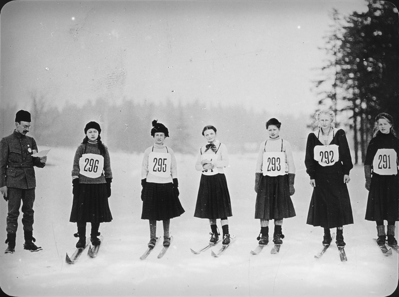 Skidtävling. B19804. Ljusbild. Kvinnliga skidåkare uppställda för skidtävling. Lantern slide. Female skiers set for skiing contest. Photo: Okänd/ Unknown, 1890-1900.